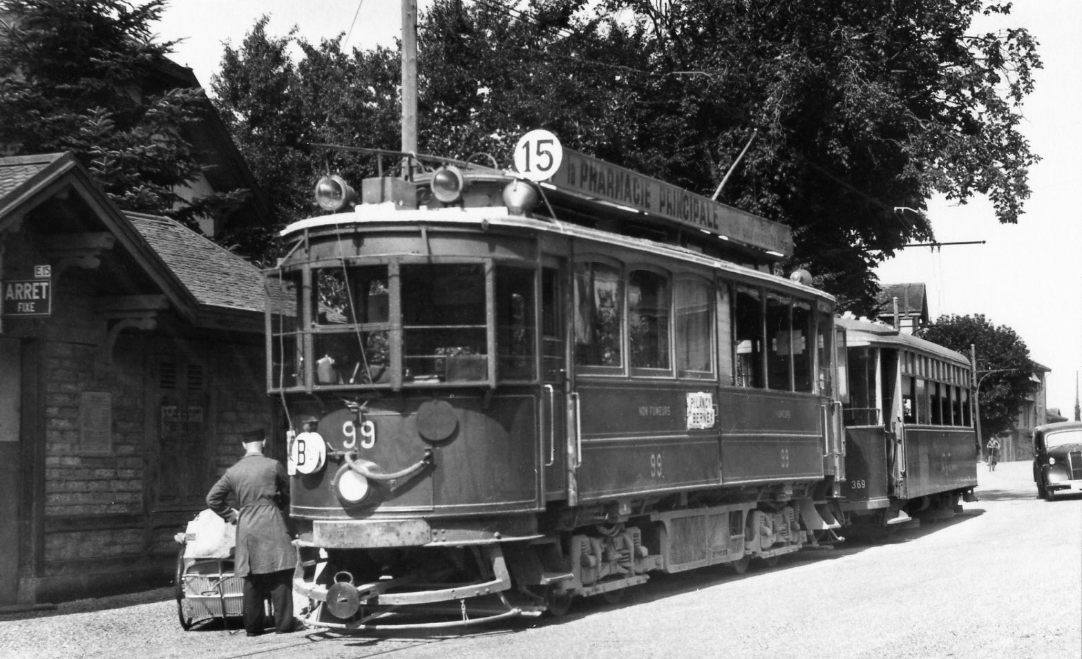 Photo: WISERMAN Près du village de Bernex en 1948, ligne fusionnée avec la ligne 2 en 1954.